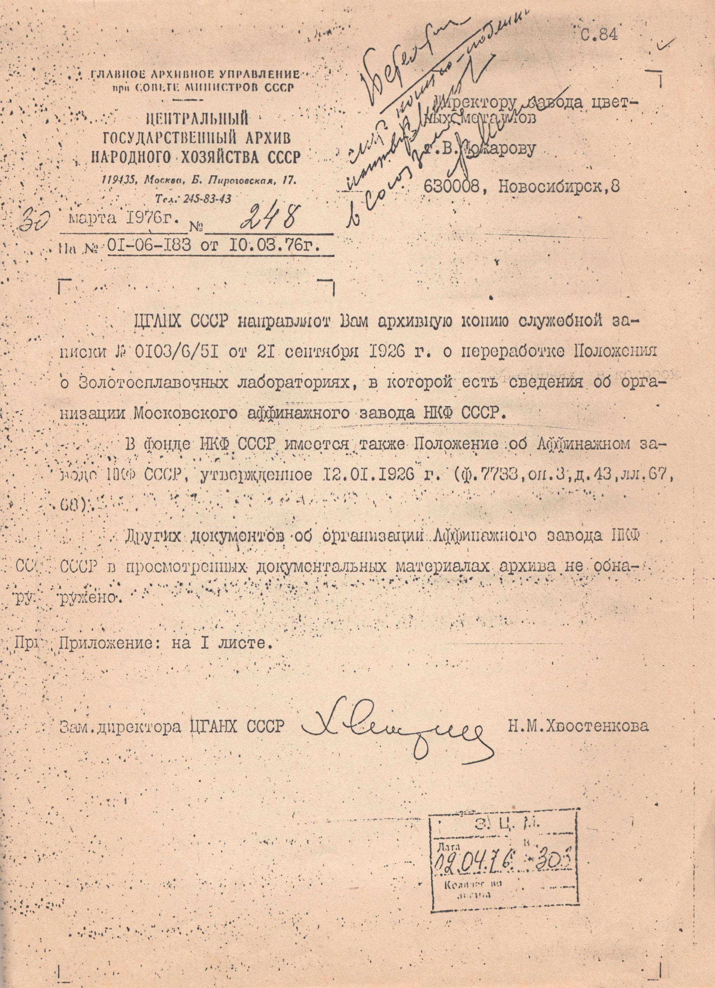 Скан бумажной версии копии Положения о Золотосплавочных лабораториях